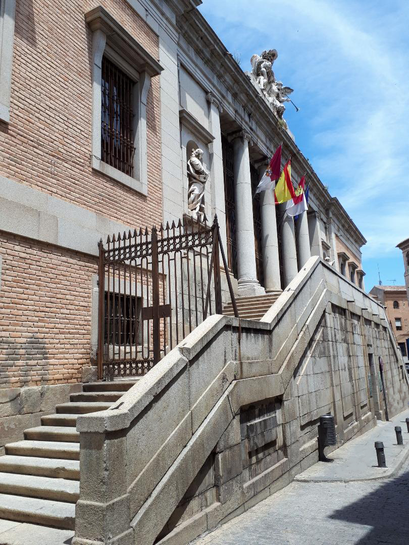 Fachada principal del Palacio del Cardenal Lorenzana, inaugurado el 22 de abril de 1799, que fue la sede de la antigua Real Universidad de Toledo (Toledo - España).